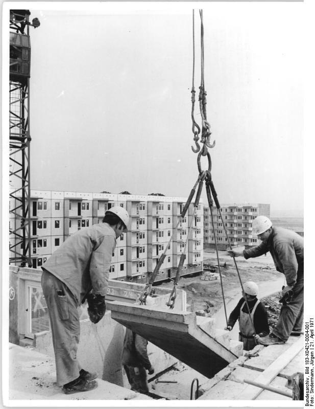 Rostock, Evershagen, Bauarbeiter Fertigteile montierend Zentralbild Sindermann 21.4.71- Rostock: Eine Spitzenposition im sozialistischen Wettbewerb haben die Montagearbeiter des Meisterbereichs Ludwig vom Wohnungsbaukombinat Rostock, die im neuen Rostocker Stadtteil Evershagen fünfgeschossige Wohnhäuser bauen. Noch vor dem VIII. Parteitag der SED soll in der Satellitenstadt Evershagen, die an der Autostrase zwischen Rostock und Warnemünde entsteht, die Schnellbaufliesfertigung beim Bau der fünfgeschossigen Häuser zur produktionsbestimmenden Bauweise werden. Vgl. K0421-02 u. 03-1N